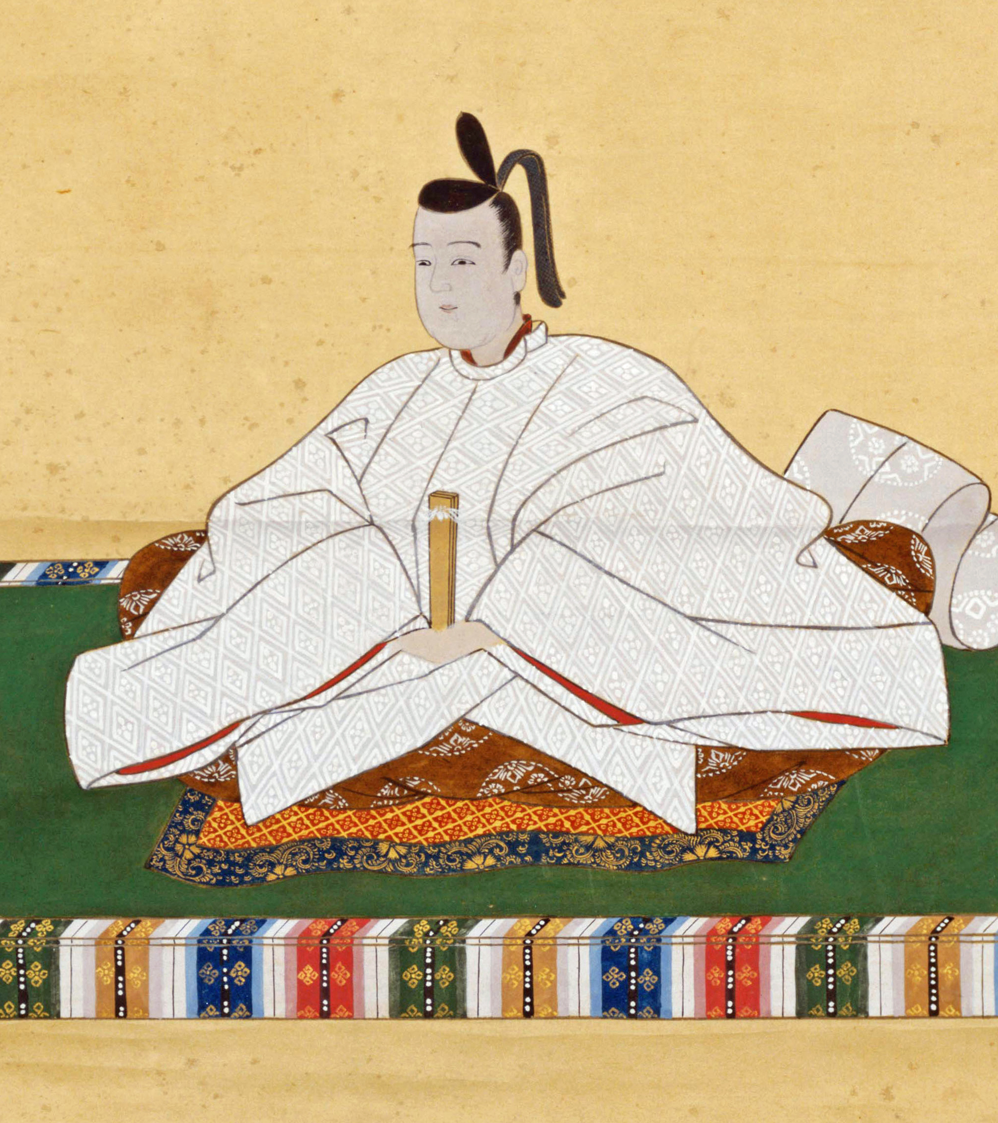 伝豊臣秀頼像（一部）。（原本は京都府養源院所蔵）